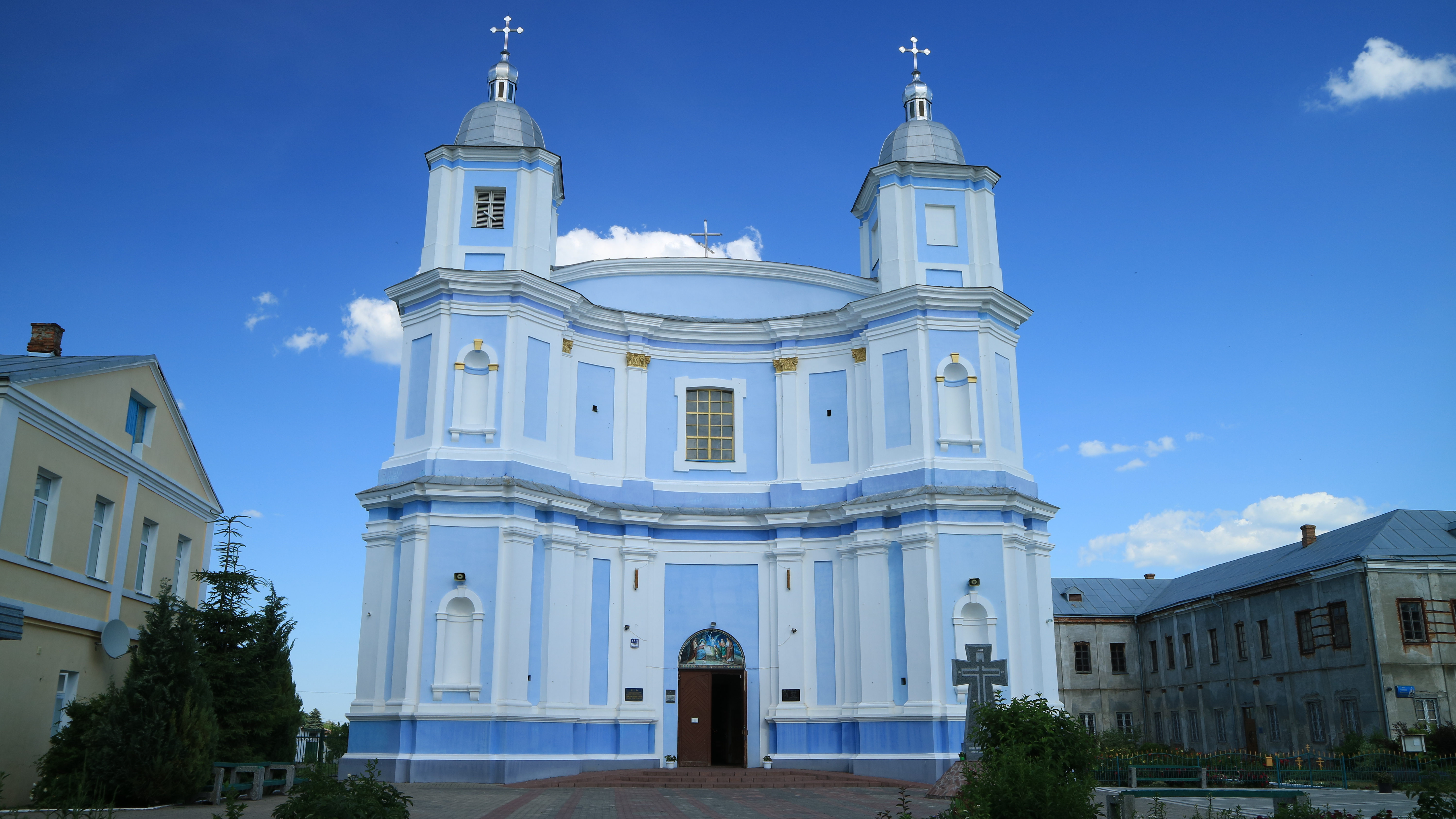 Костел послання Апостолів (собор Різдва Христового) (мур.), Володимир-Волинський, вул. Миколаївська, 20